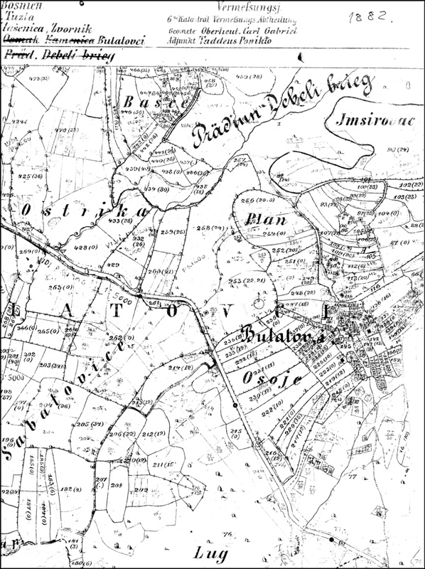 Iz arhive